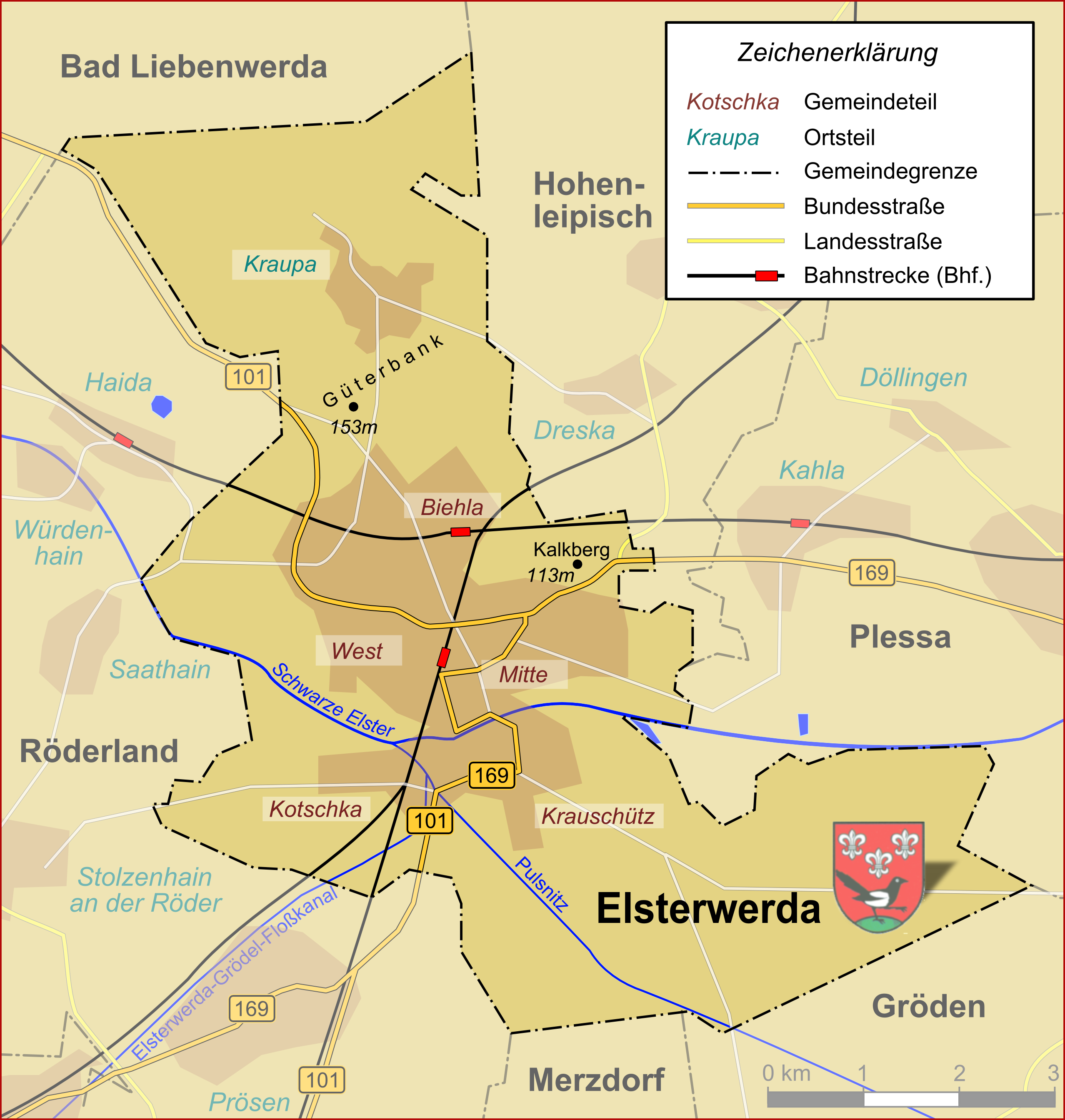 Übersichtskarte des Gemeindegebietes von Elsterwerda, Deutschland.